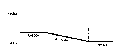 Krümmungsband einer Eiklotoide